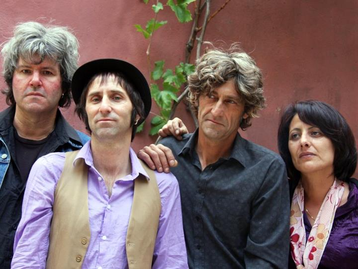 Gil Rose et les Hydropathes